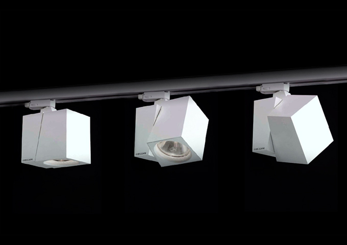 箱型ランプ